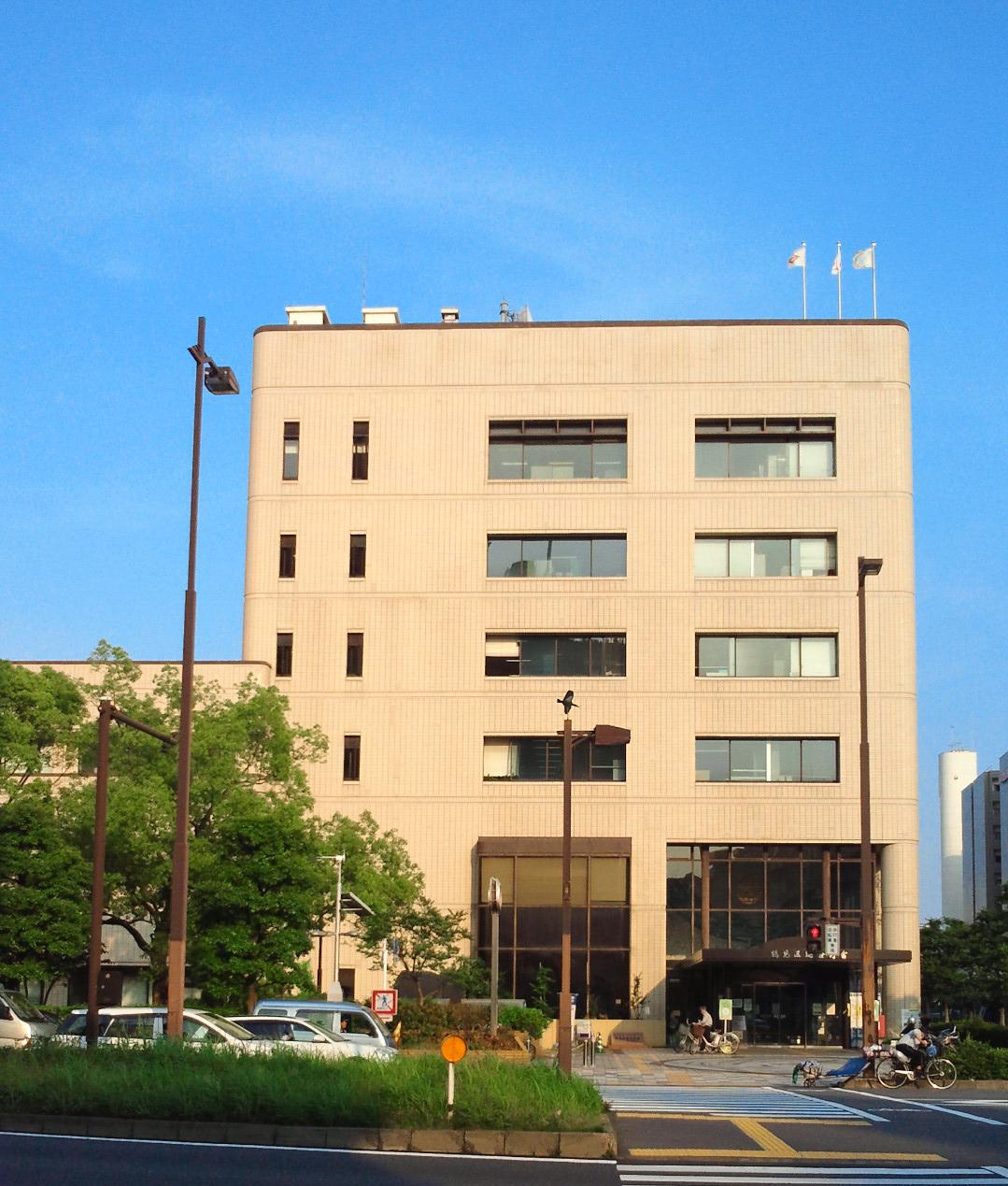 神奈川県横浜市鶴見区役所庁舎